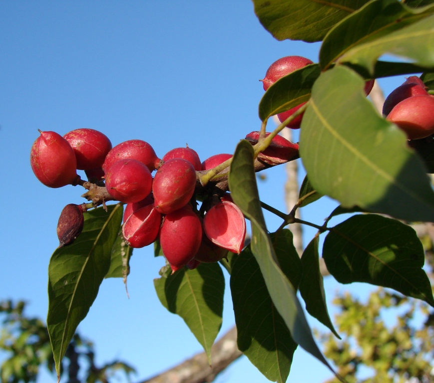 Protium heptaphyllum - BURSERACEAE Parque Olhos D'Água - Brasília - Distrito Federal - Brasil.